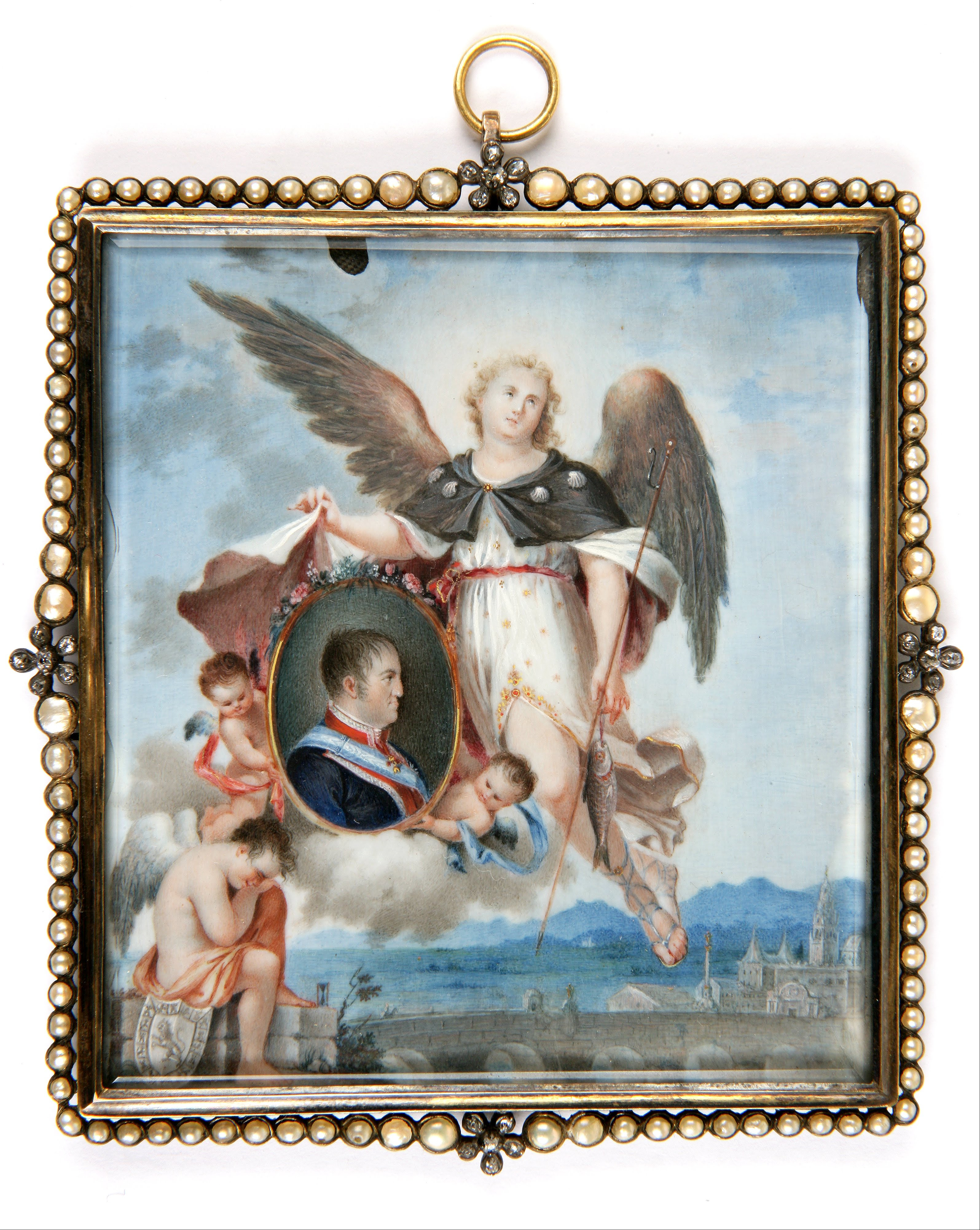 La obra es una representación alegórica del rey Fernando VII de España (1784-1833), que fue hijo del rey Carlos IV de España y de la reina María Luisa de Parma.